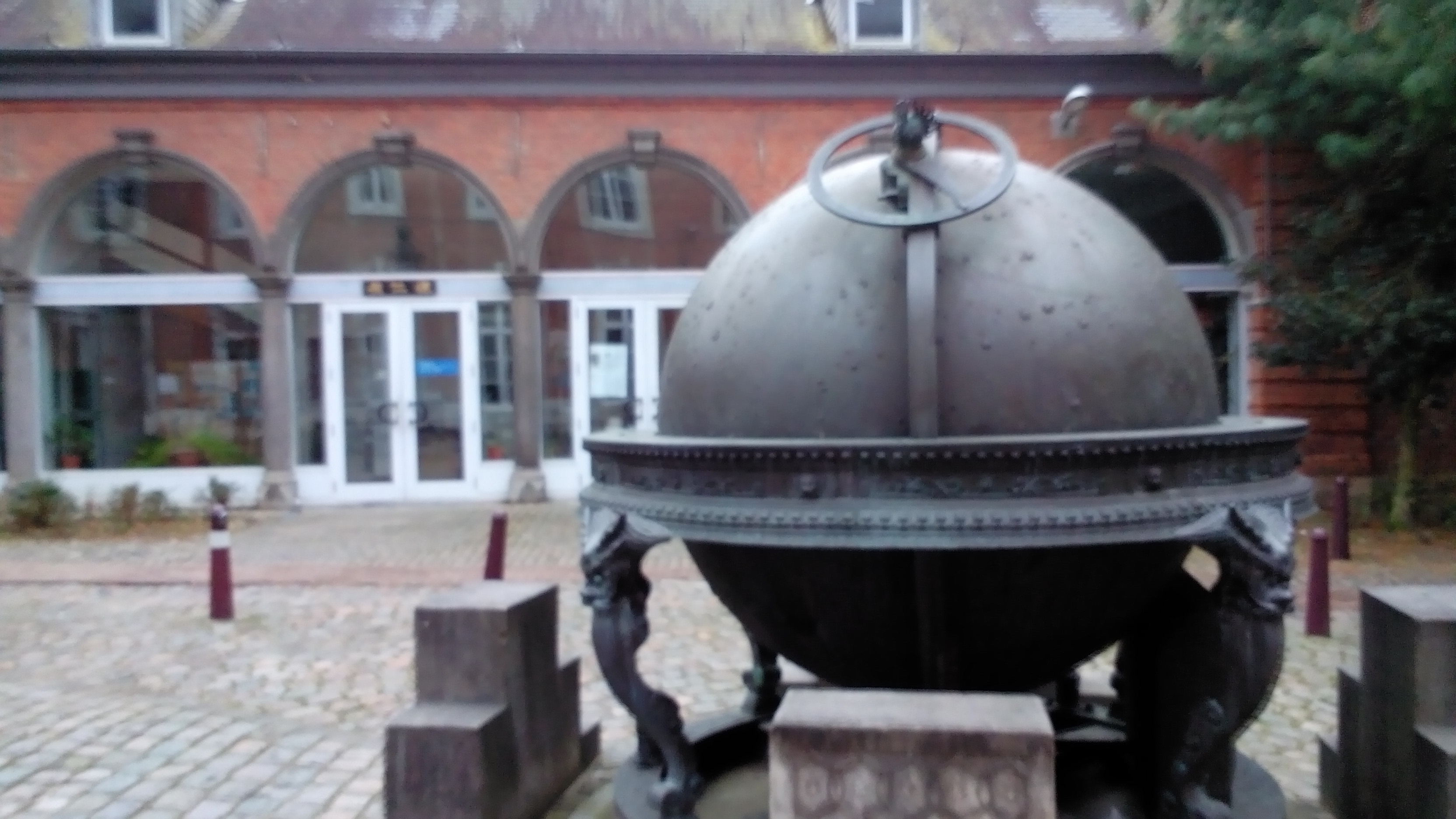 Binnenkoer Atrechtcollege in Leuven